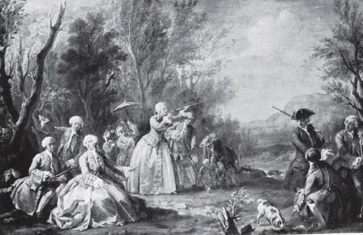 Höfische Sommerpartielabel QS:Lde,"Höfische Sommerpartie"